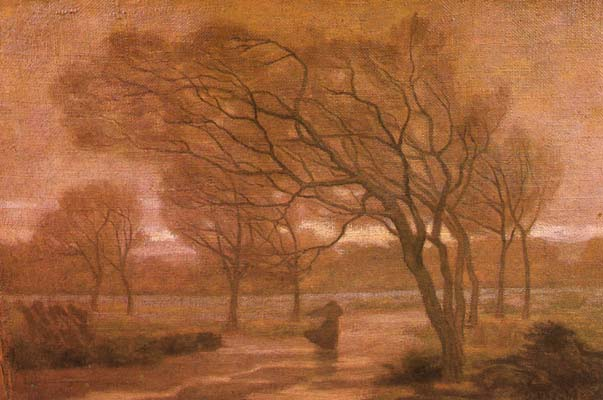 viento puelche Casa del Arte Native namePinacoteca de la Universidad de Concepción Casa del Arte de la Universidad de Concepción Casa del Arte José Clemente OrozcoLocationConcepción, ChileEstablished1967WebsitePinacoteca de la Universidad de Concepción